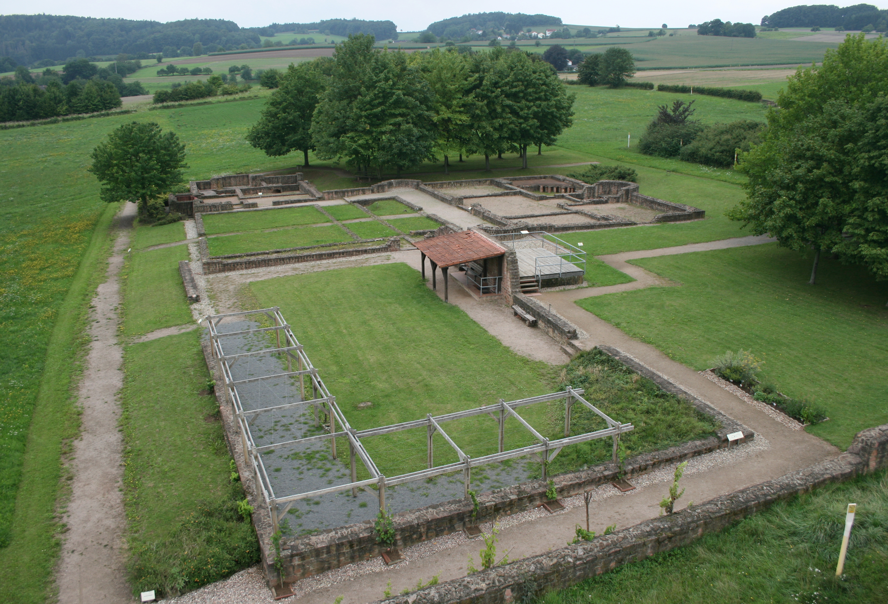 Römische Villa Haselburg, Gesamtansicht von Südosten, mit freundlicher Unterstützung der freiwilligen Feuerwehr Höchst i. Odw.